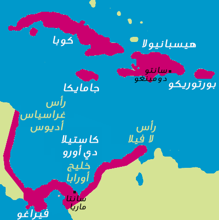 تاج قشتالة